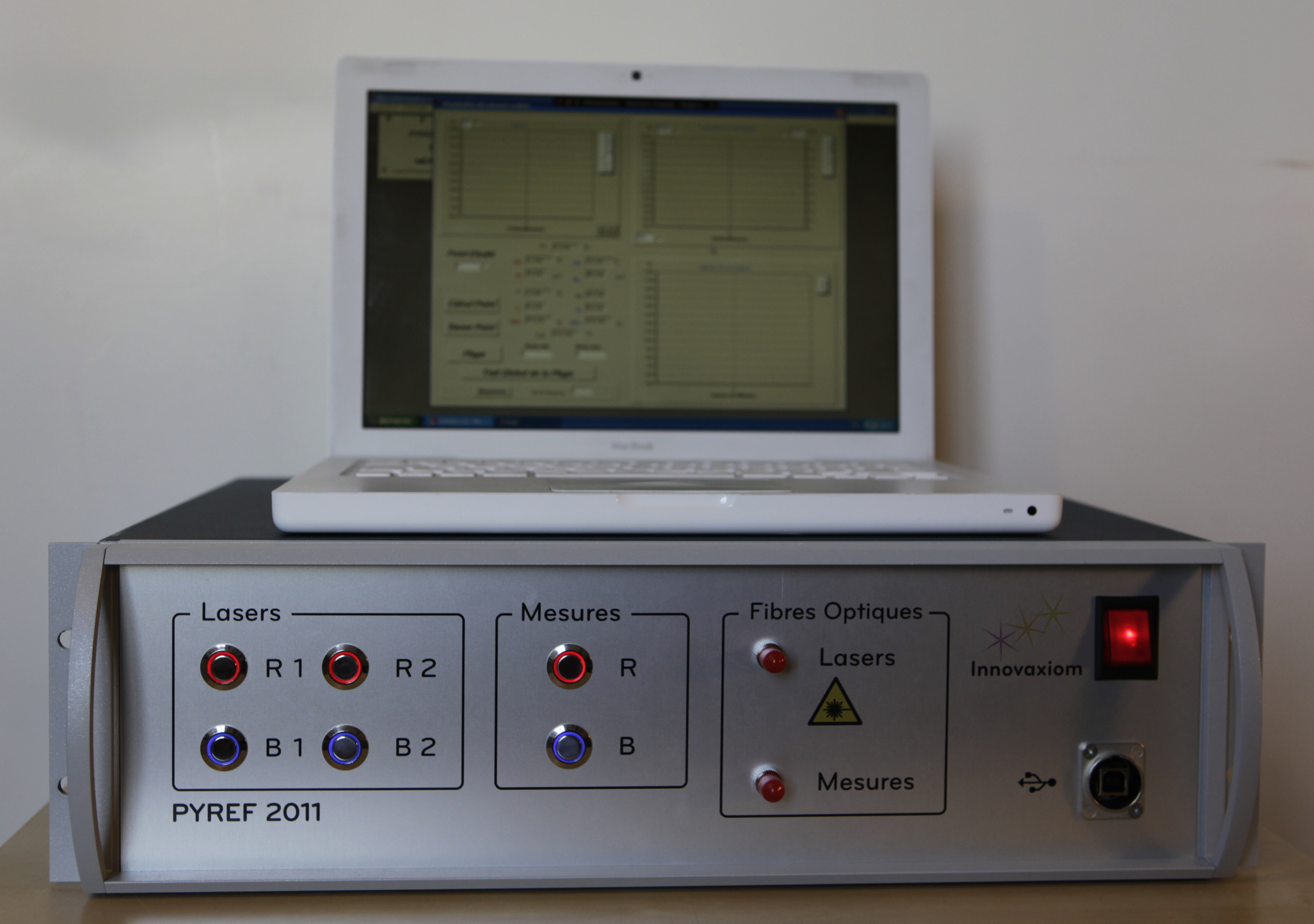 Pyroreflectometre Innovaxiom 2011